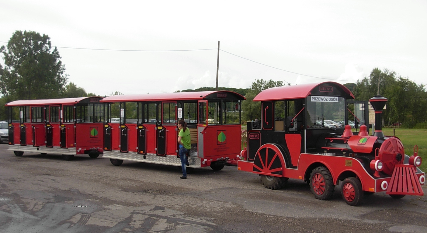 Kolejka w Leśnym Parku Kultury i Wypoczynku w Bydgoszczy